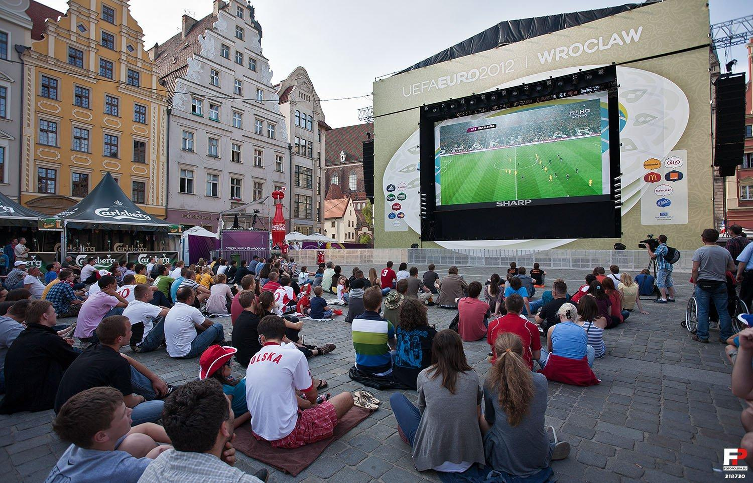 Wspólne oglądanie meczu w strefie kibica na placu gołębim wrocławskiego rynku. Pierwsze minuty starcia Francji z Ukrainą, tuż przed przerwą w meczu z powodu ulewy.